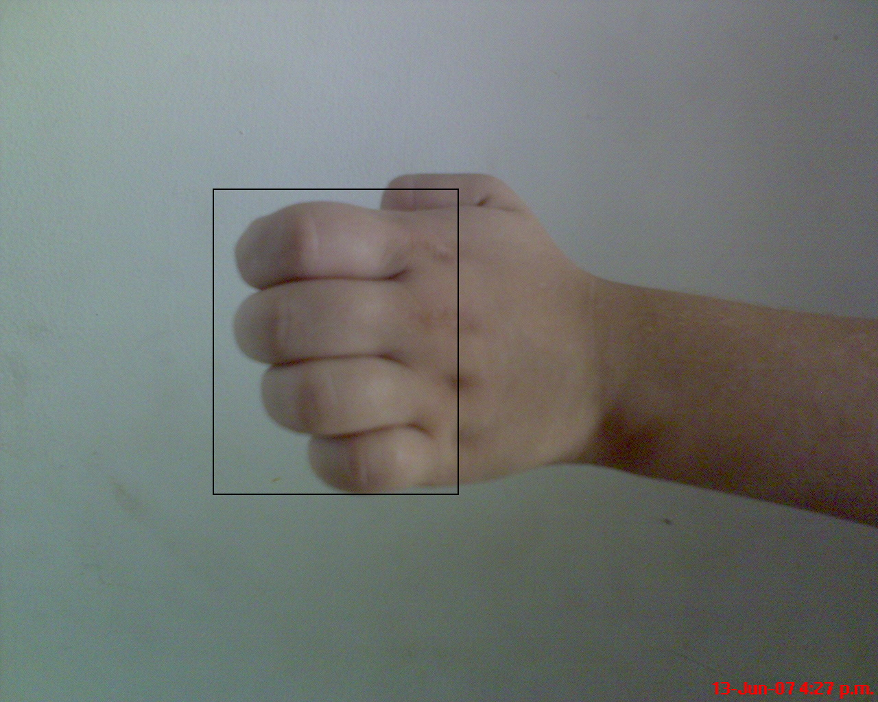 Golpe Hirakn